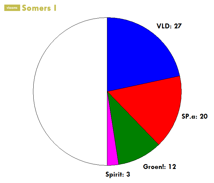 zetelverdeling van de meerderheidscoalitie van Somers I (2004-). "politieke voorstelling"